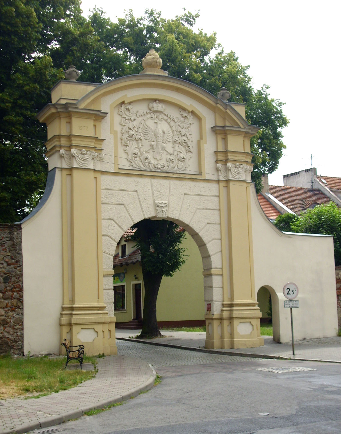 Brama Krośnieńska (Piastowska) w Sulechowie